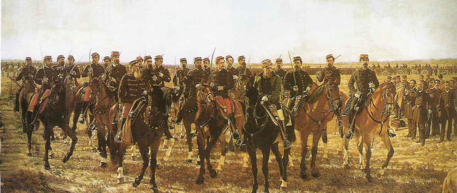 “Ocupación militar del Río Negro en la Expedición bajo el mando del General Julio A Roca, 1879”. Óleo sobre tela. Autor: Juan Manuel Blanes, 1896. (Medida: 7100 x 3550 mm.). Donación del Ministerio de Guerra, 3-IX-1898.